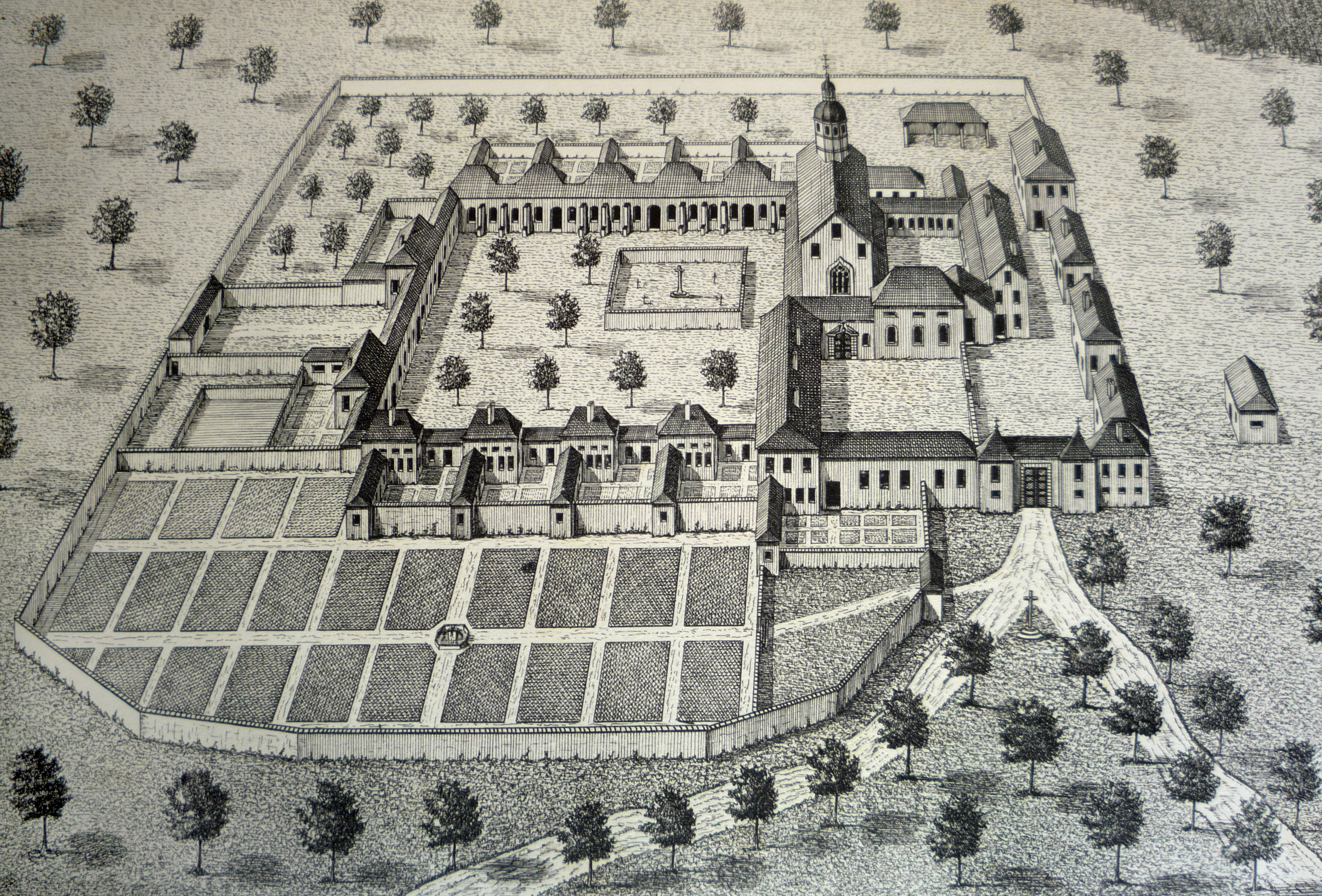 Gravure de la Chartreuse de Meyriat (Vieu d'Izenave, Ain, France), faite d'après un tableau du XVIIIe siècle conservé à la Grande Chartreuse et reproduite dans le livre : Maisons de l’Ordre des Chartreux. Vues et notices. Montreuil-sur-Mer, 1913-1919, p. 172.